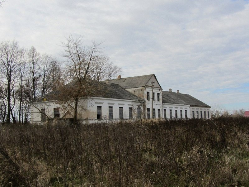 Туча. Сядзібны дом